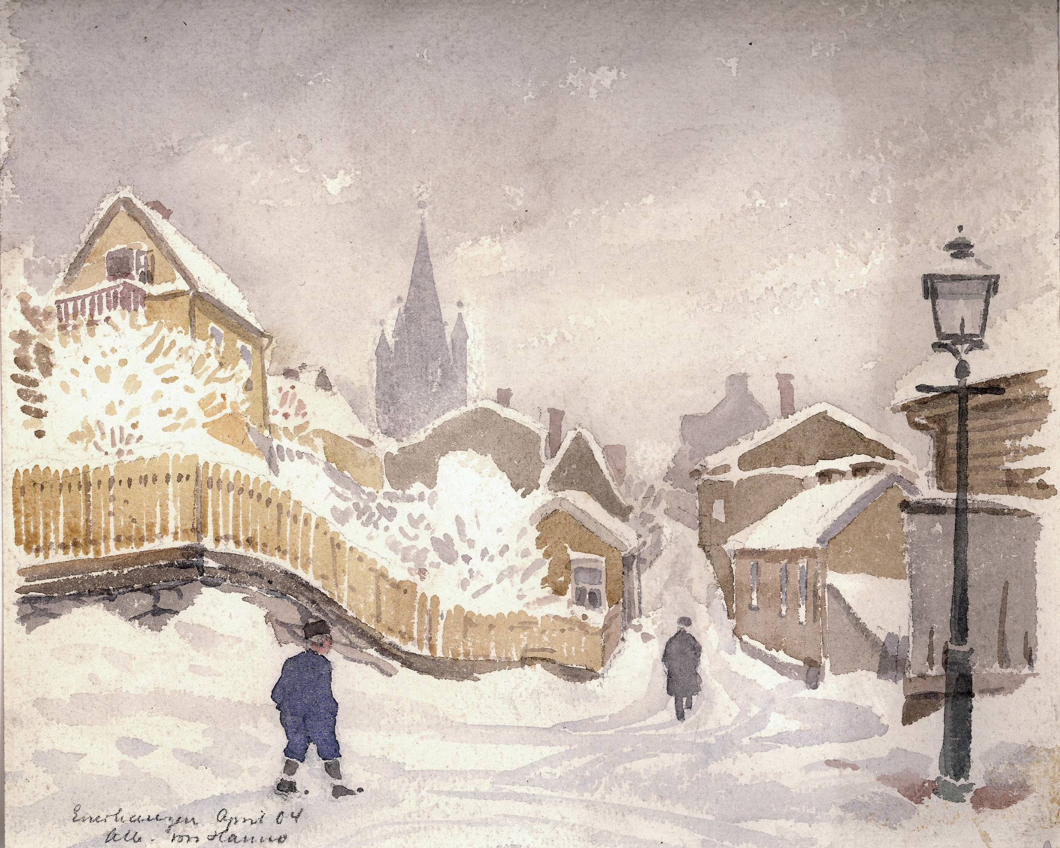 Enerhaugen April 04, gateløp, vinterbilde, gasslykt.